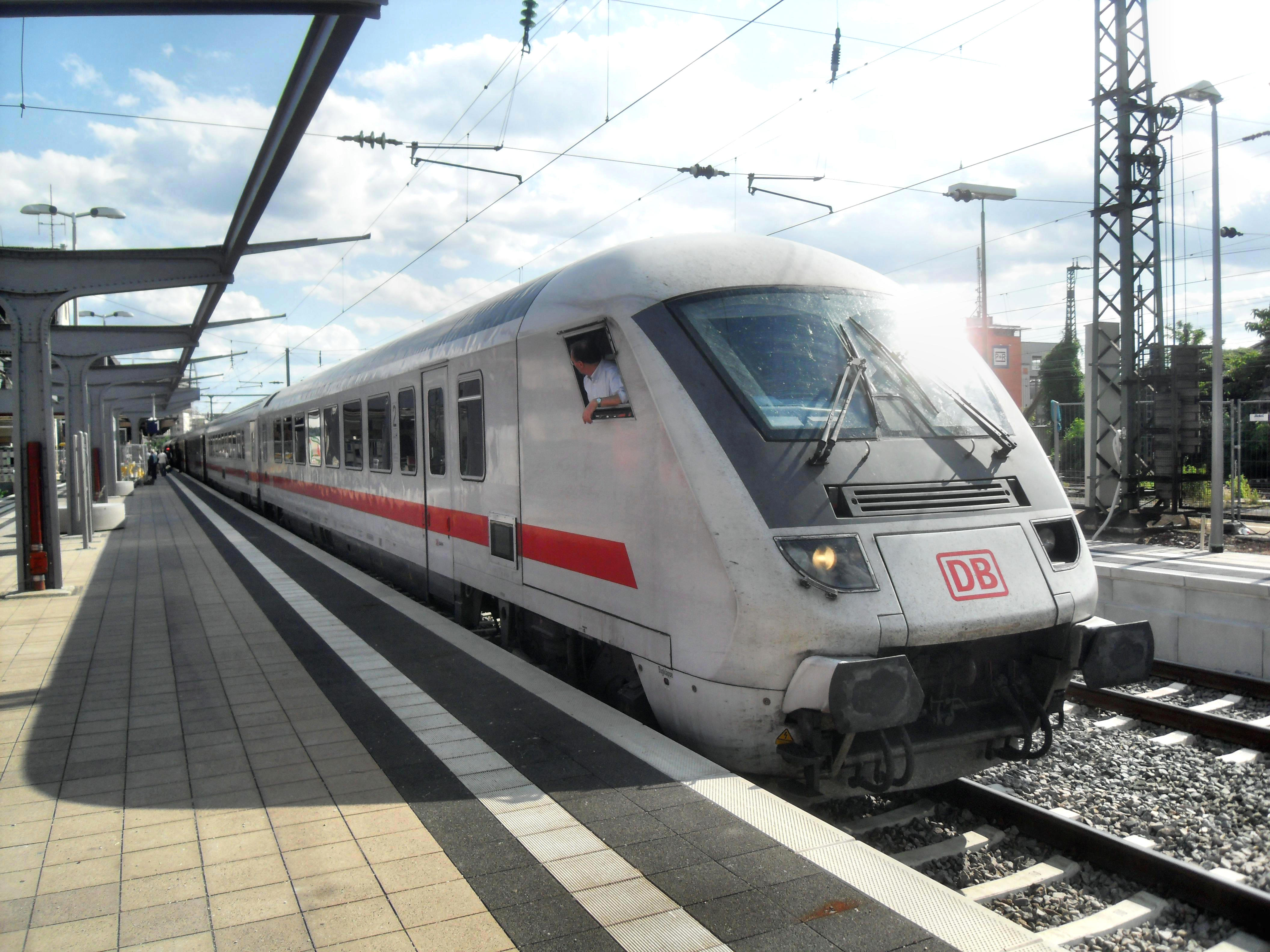 EuroCity-Steuerwagen des EC „Wörthersee“ im Wormser Hauptbahnhof auf dem Weg nach Dortmund. Vom Bahnsteig zu Gleis 1 Blickrichtung Ludwigshafen fotografiert.